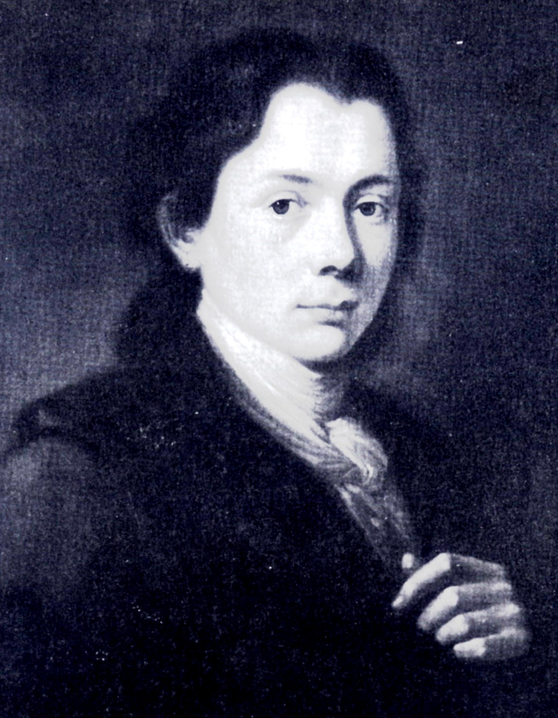 Georg Peter Bruckmann, Heilbronner Silberwarenfabrikant (1778–1850). Zeitgenössisches Gemälde aus dem 19. Jahrhundert